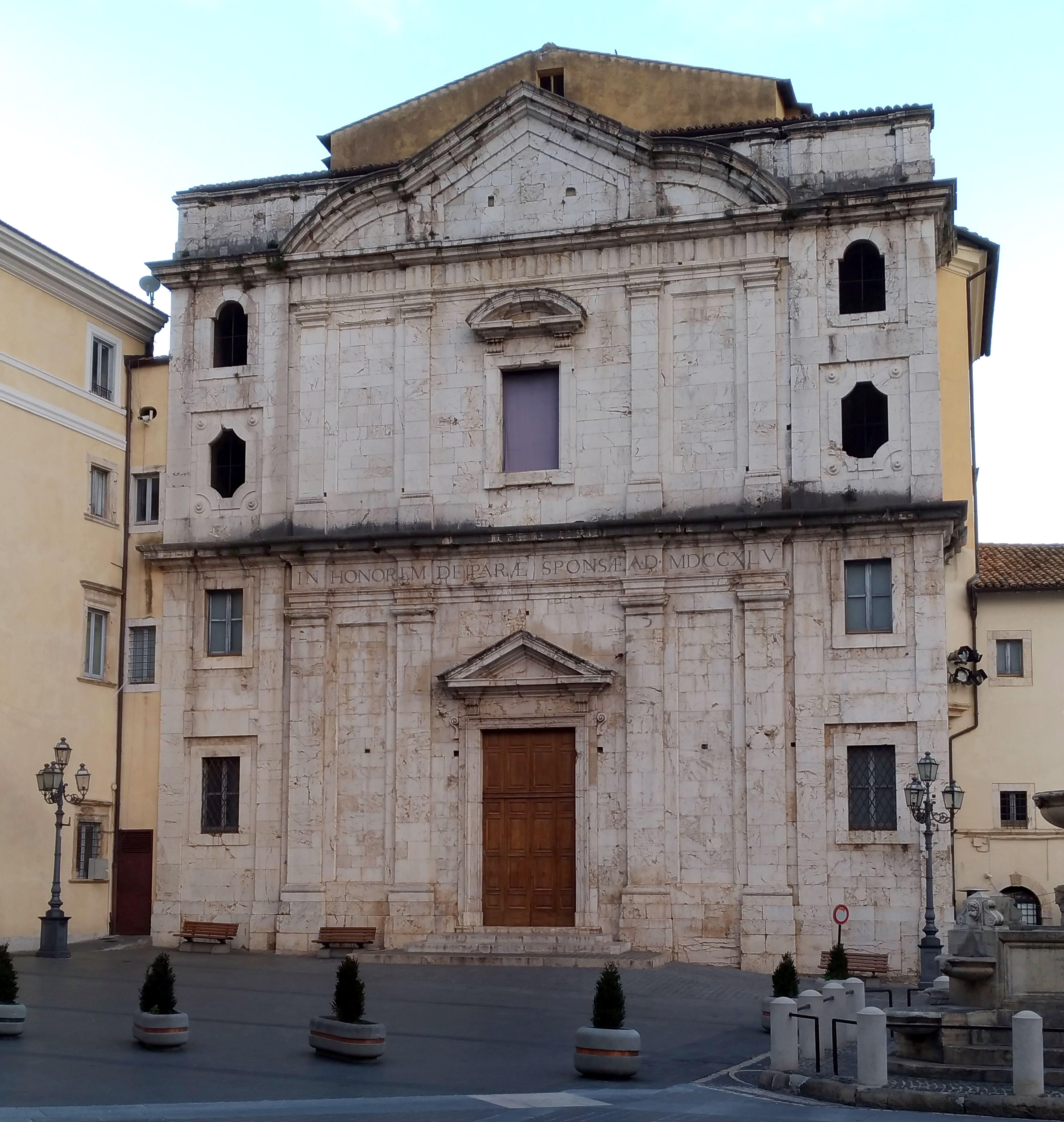 Chiesa degli Scolopi (Alatri)